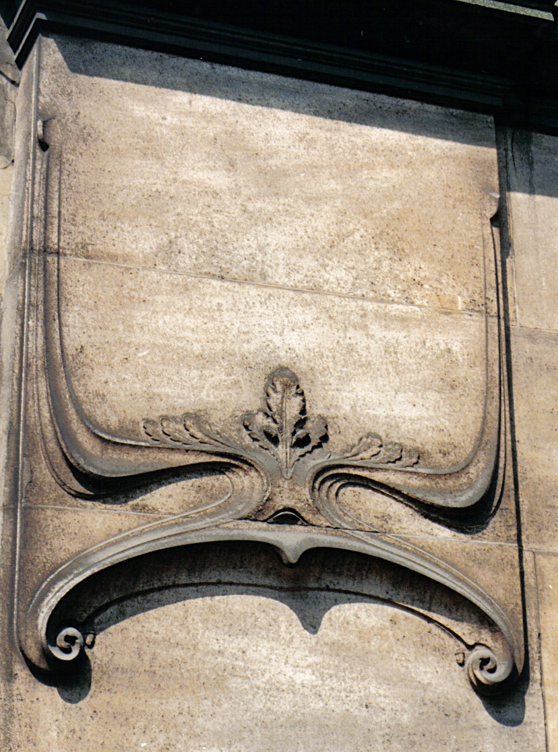 Henri Jacobs - Ecole Josaphat à Schaerbeek - détail (Art nouveau)